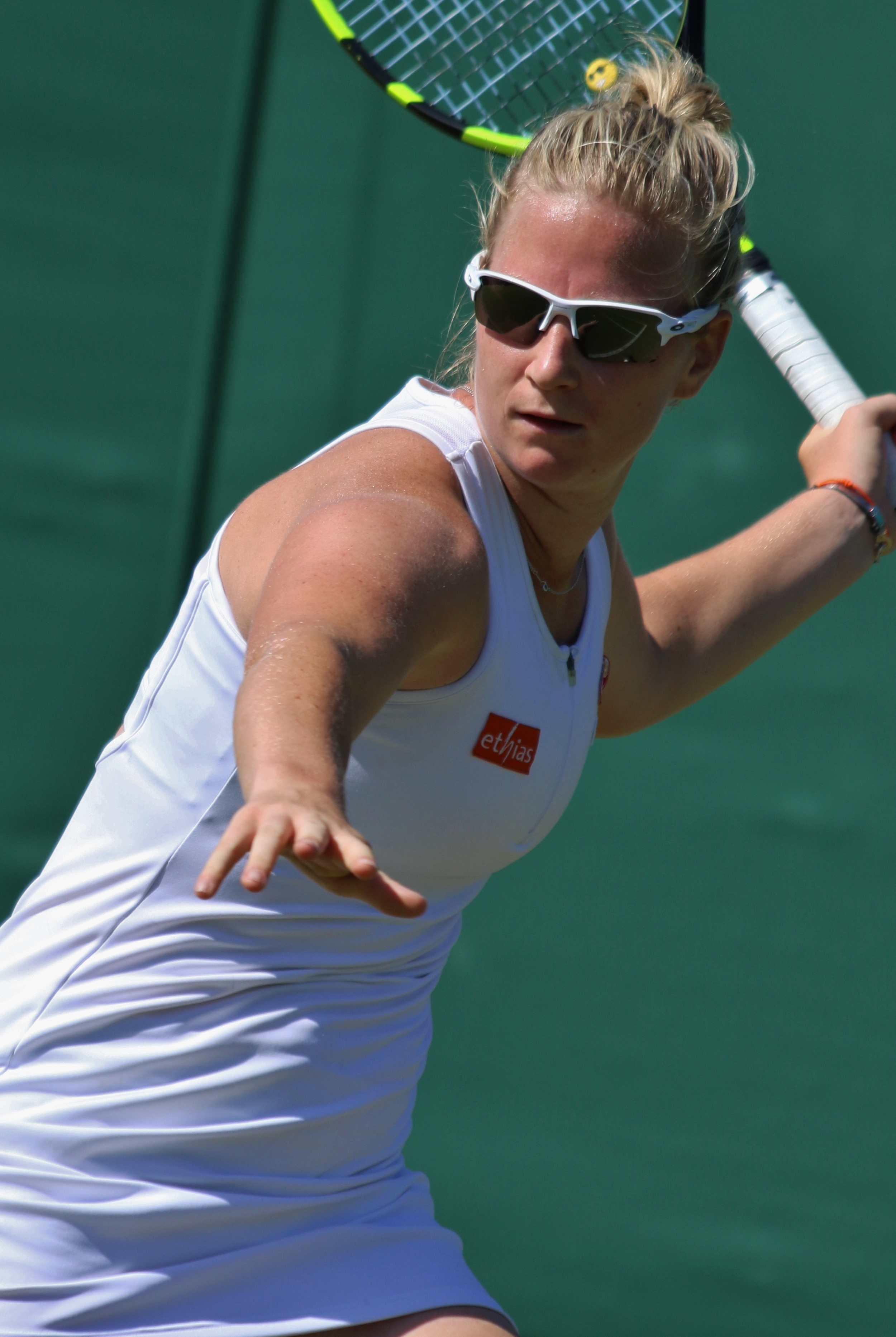 Bonaventure WMQ18 (16)